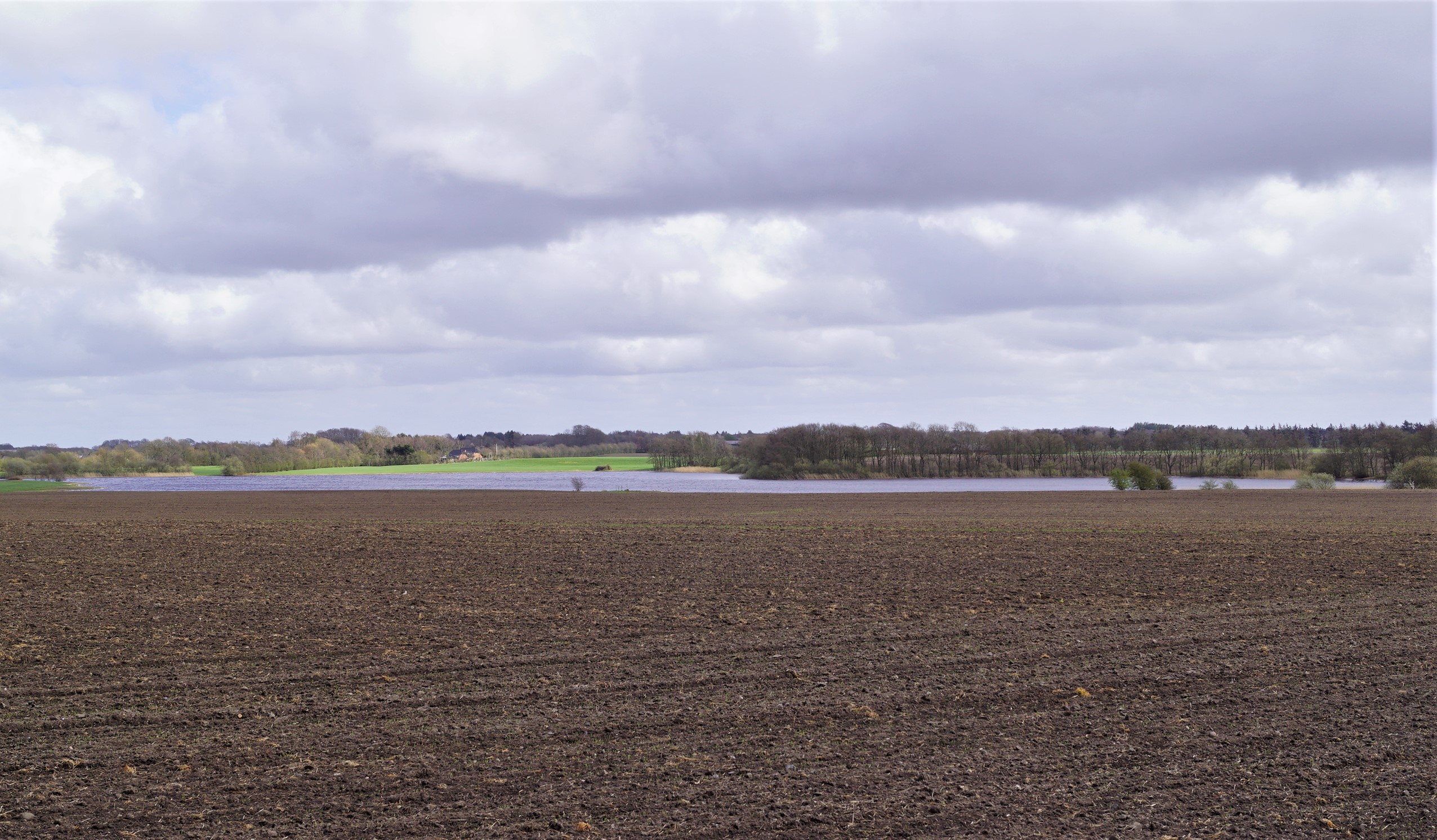 Hauge Sø set fra vest, Monumentet for Slaget på Grathe Hede